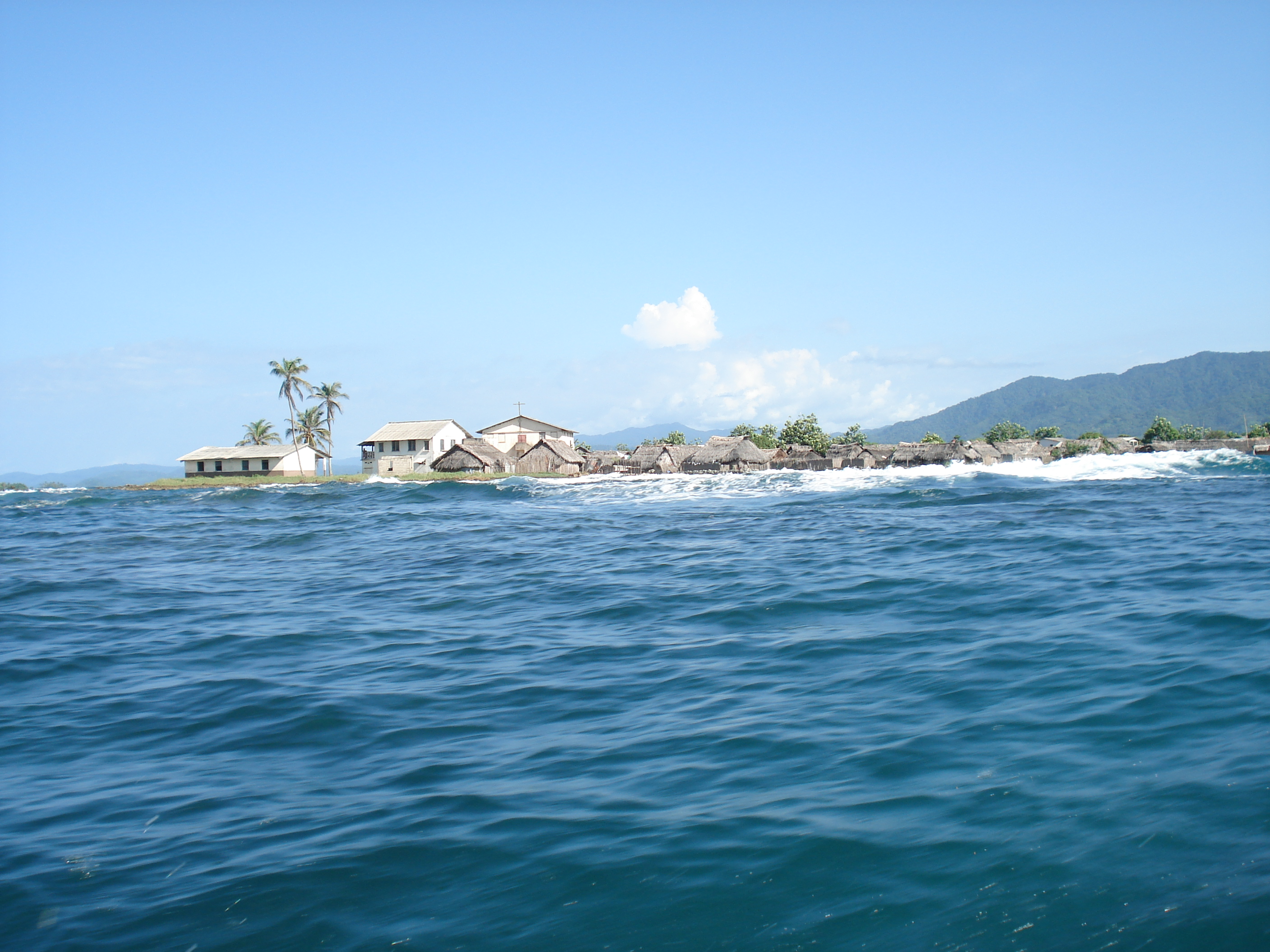 Punta de Mulatupo